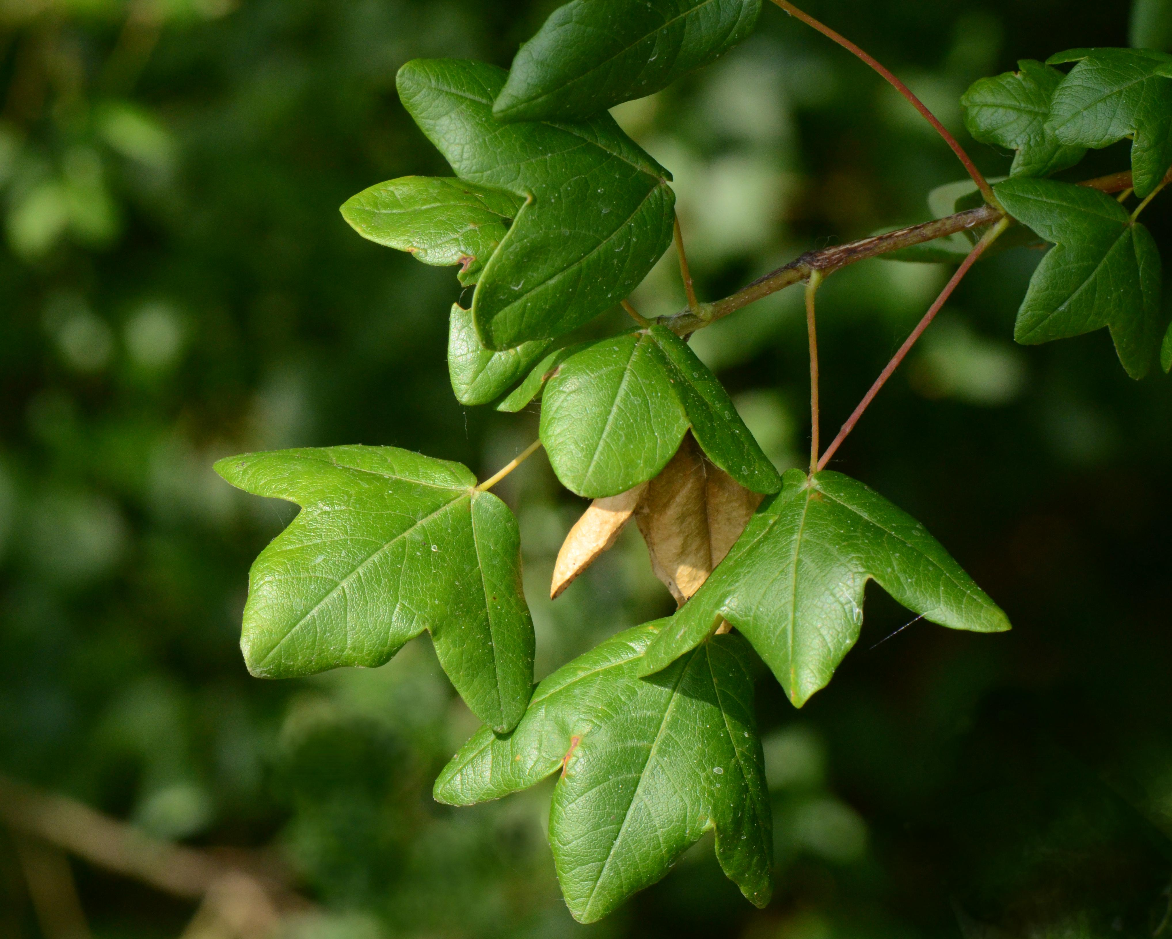 Acer mondpessulanum, feuilles trilobées, Cherve, Charente, France